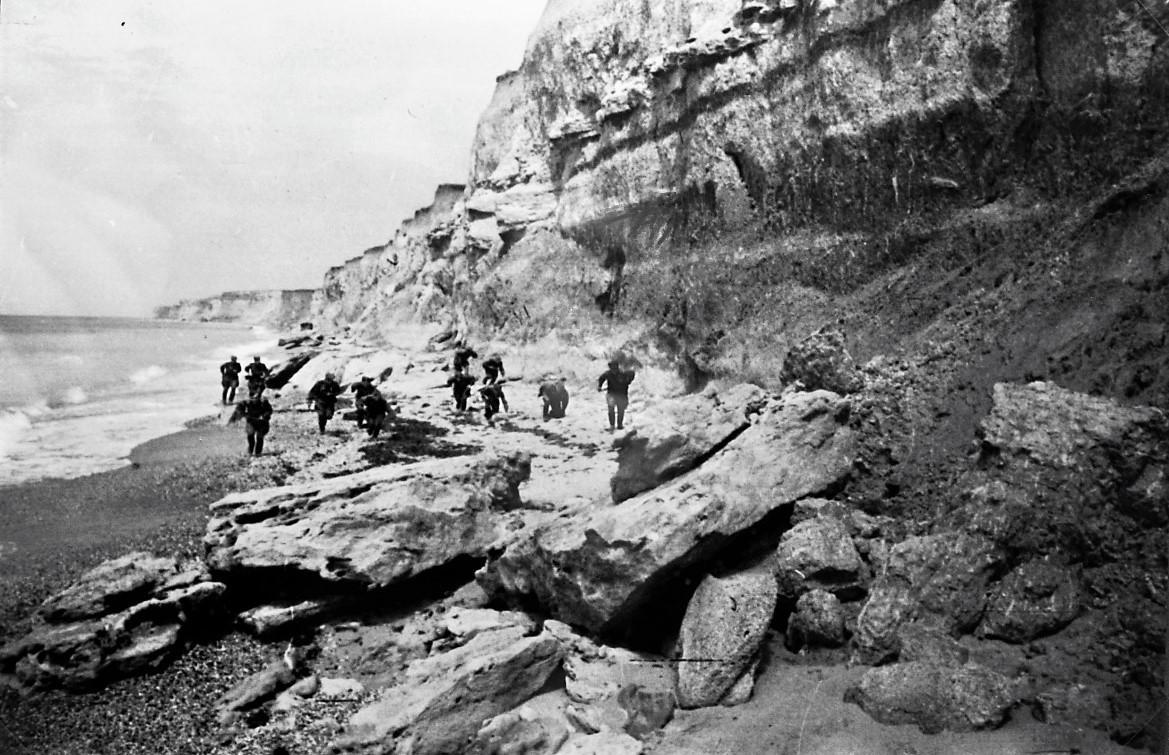 Под Севастополем. Бойцы гвардии старшего лейтенанта Александрова атакуют противника